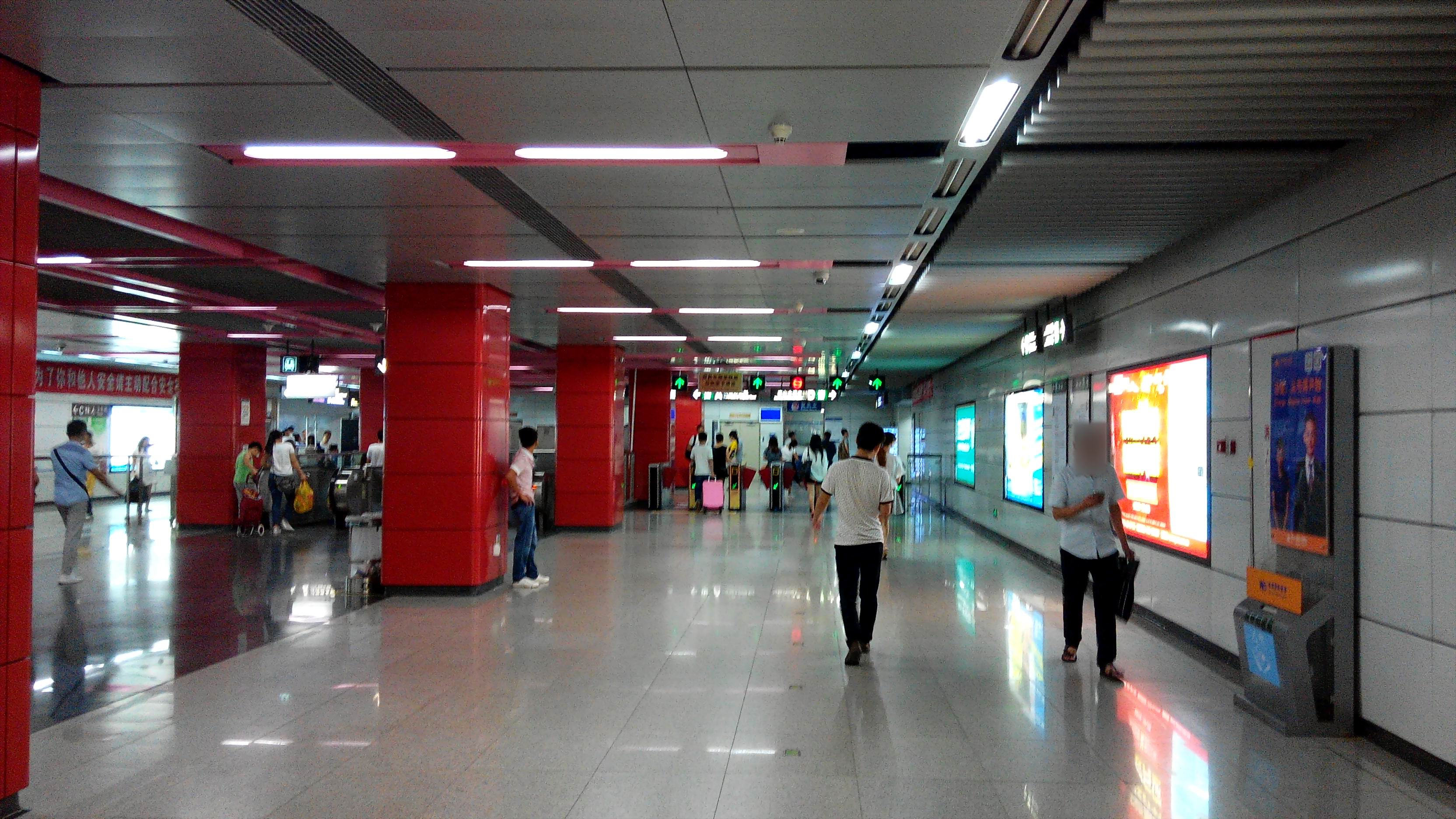 深圳地铁1号线 桃园站 大堂